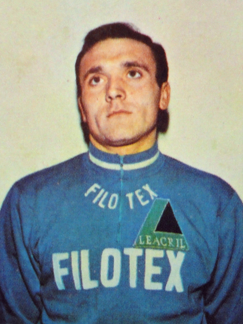 Figurina CAMPIONI DELLO SPORT 1969/70-n.204-COLOMBO (ITA)-CICLISMO-rec